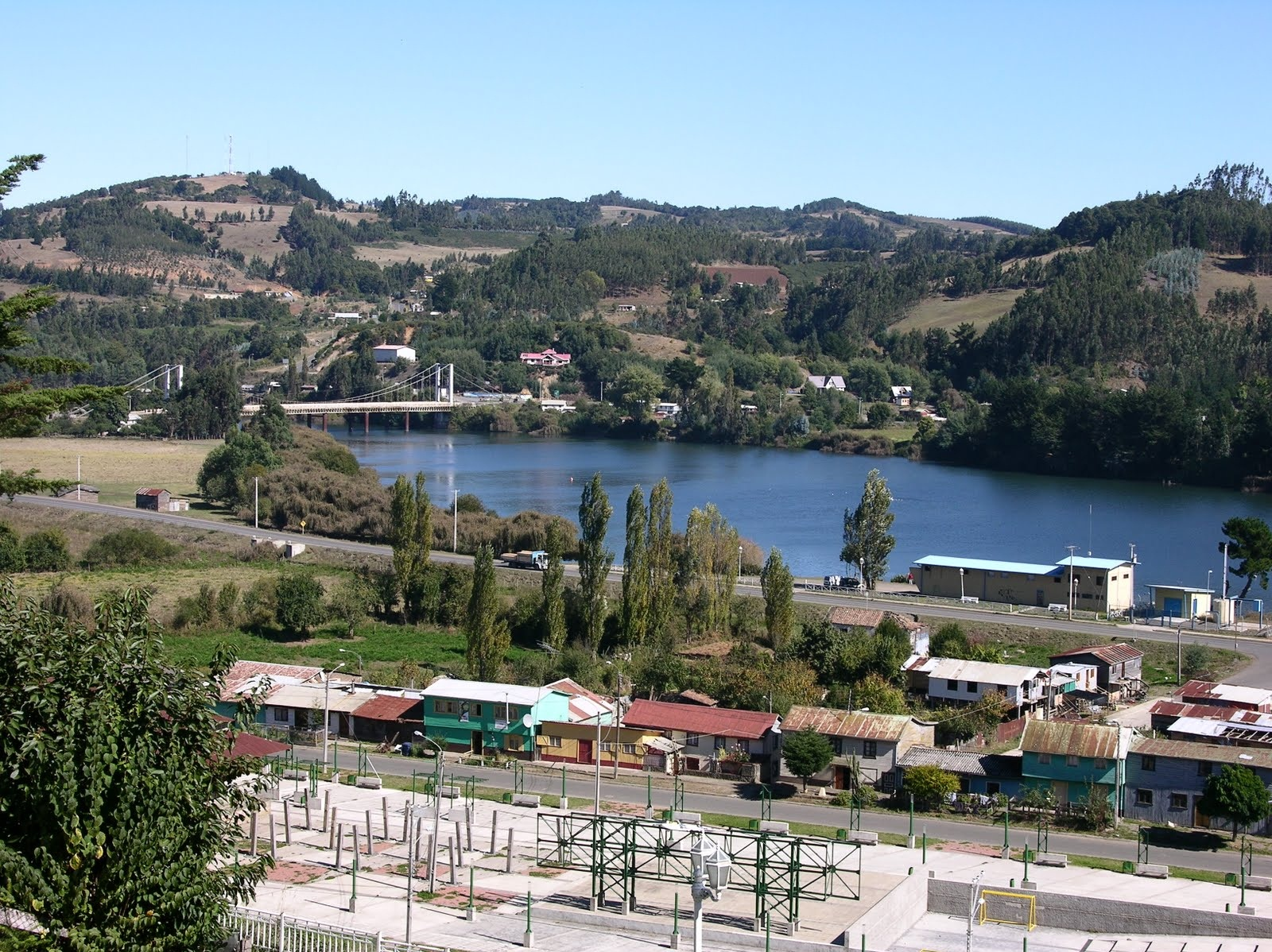 Fotografía desde el Mirador de la Avenida Ercilla, con vista a la Villa estación, el río Imperial y el Puente Presidente Eduardo Frei Montalva